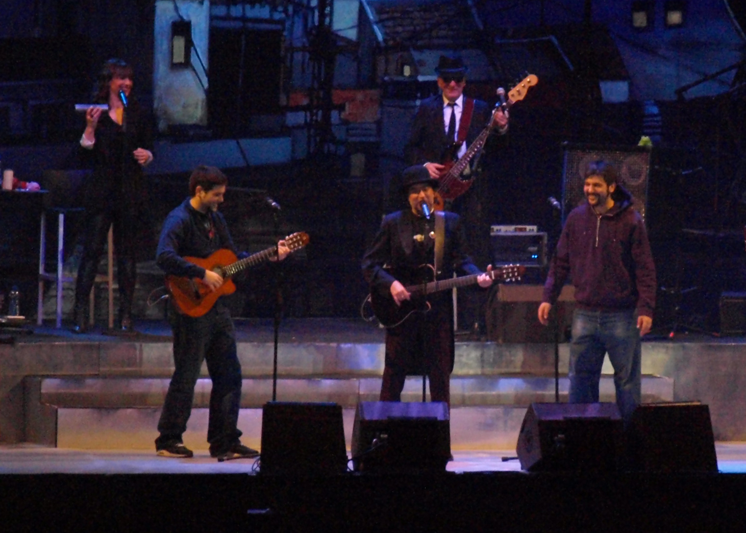 Estopa, invitados de Joaquín Sabina en el concierto de la gira Vinagre y Rosas en el Palau Sant Jordi de Barcelona (España) en noviembre de 2009.